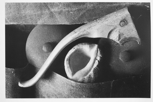 František Provazník´s photograph. Fotografie Františka Provazníka.